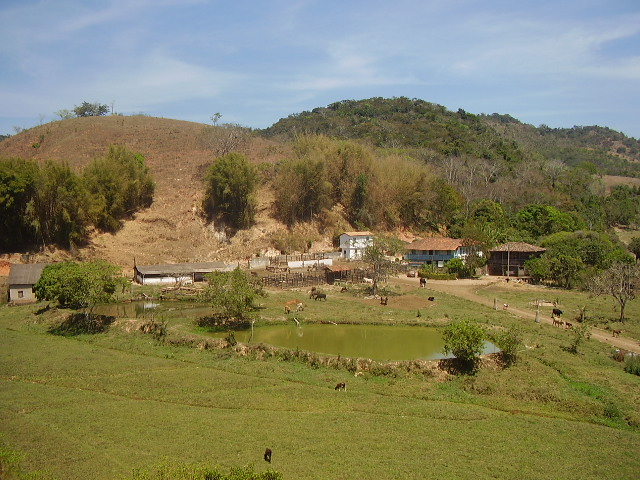 Esta é a maior fazenda de Santo Antônio do Rio Abaixo.